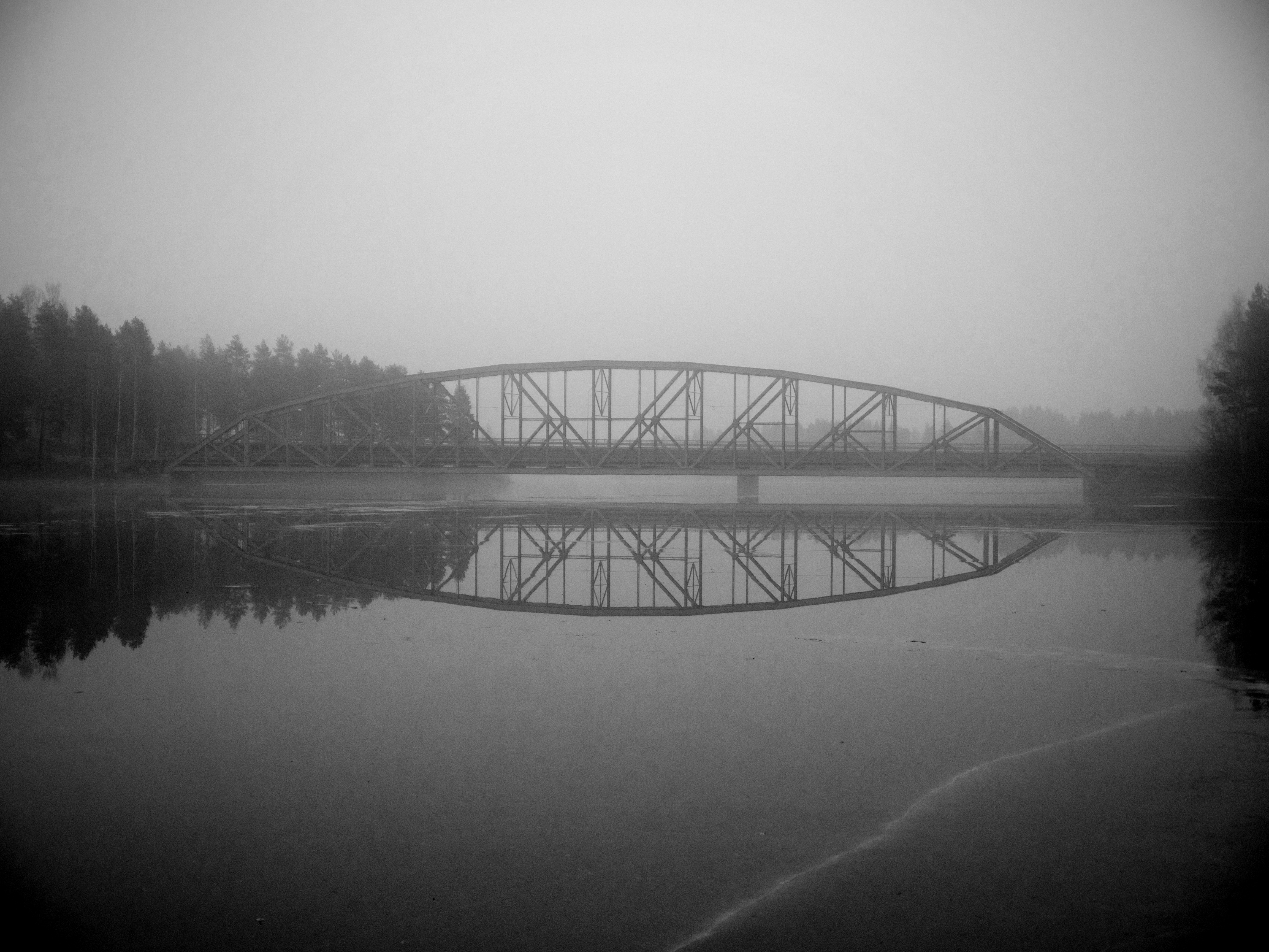 Hedenbron i boden strax uppströms bodens vattenkraftverk, 2012. Observera att nyare stålbalkbro syns bakom bron på bild och ger en missvisande bild av brons konstruktion.